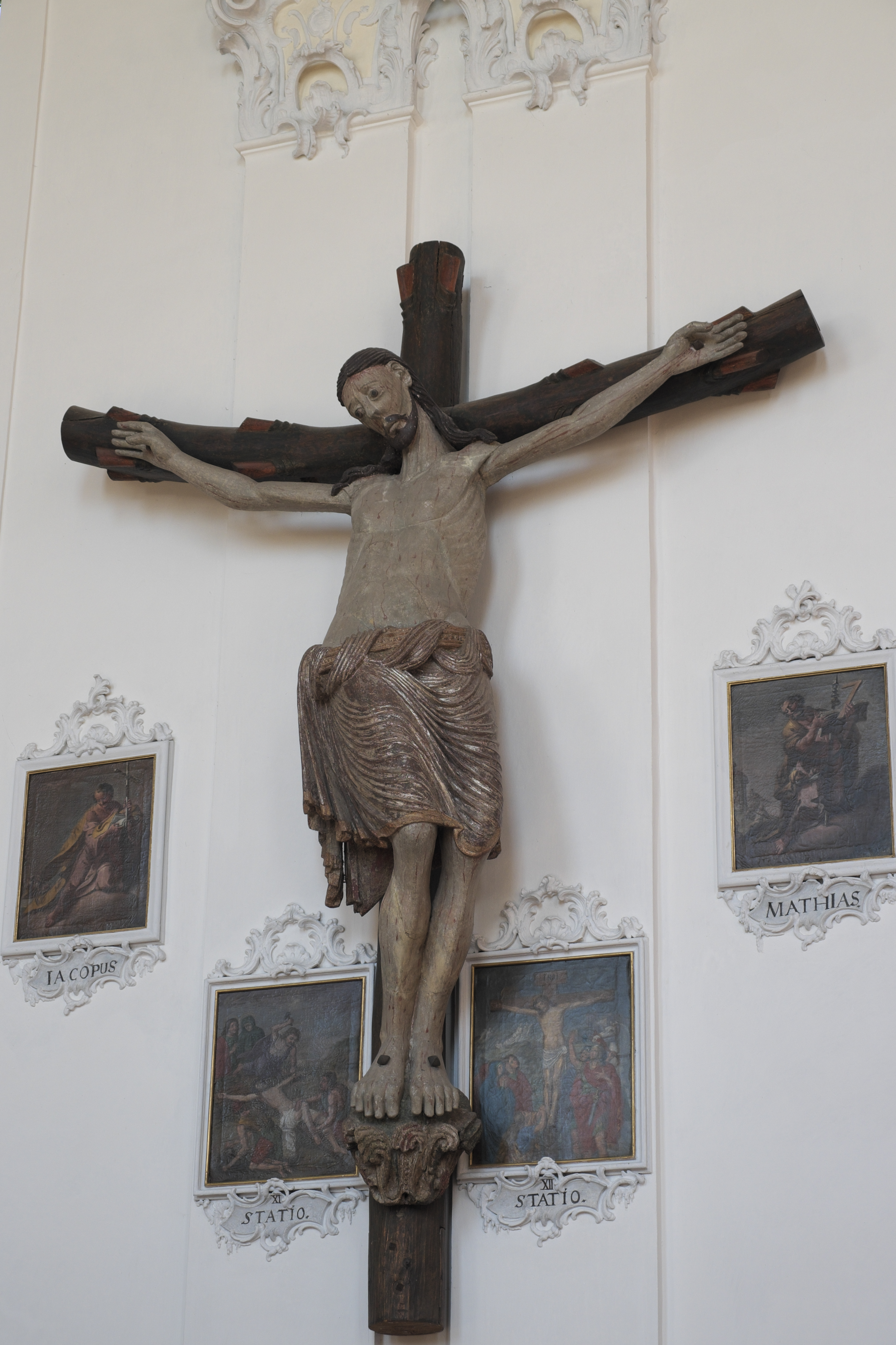 Katholische Pfarrkirche St. Johannes Baptist in Wessobrunn im Landkreis Weilheim-Schongau (Bayern/Deutschland), romanisches Viernagelkruzifix, um 1220